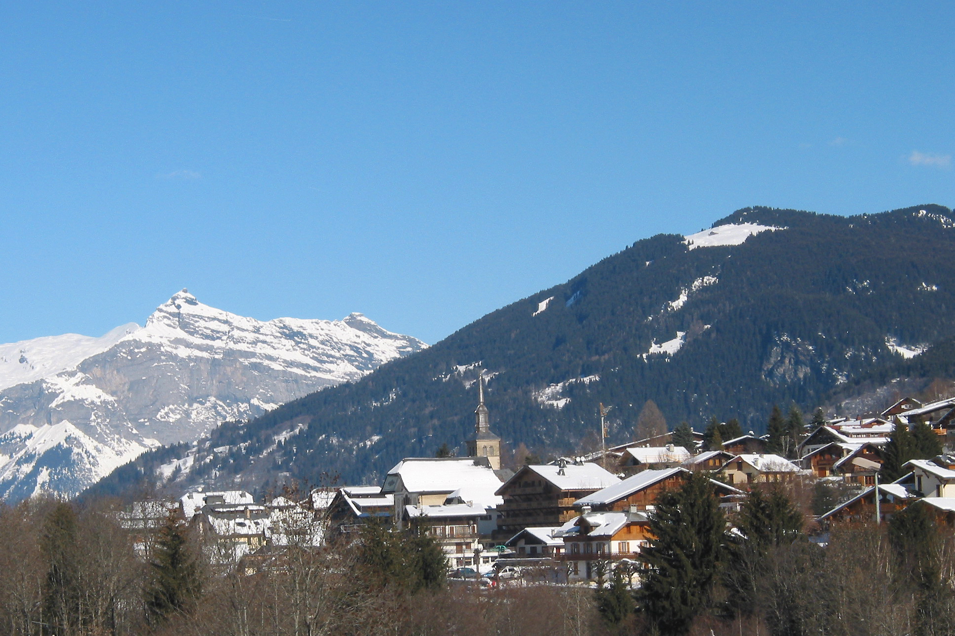 Les Contamines-Montjoie (Haute-Savoie - France), le village.